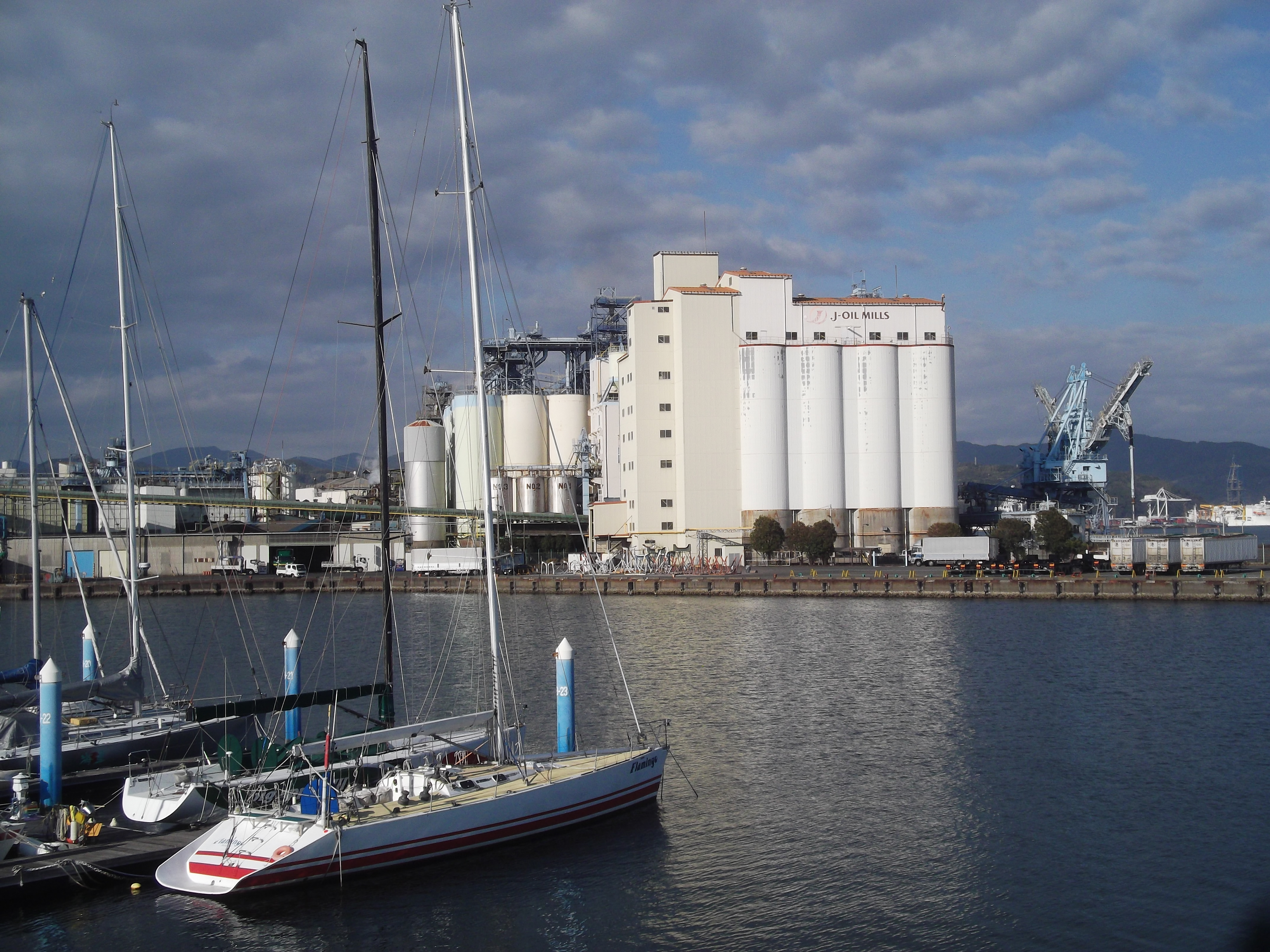 J-オイルミルズ静岡工場